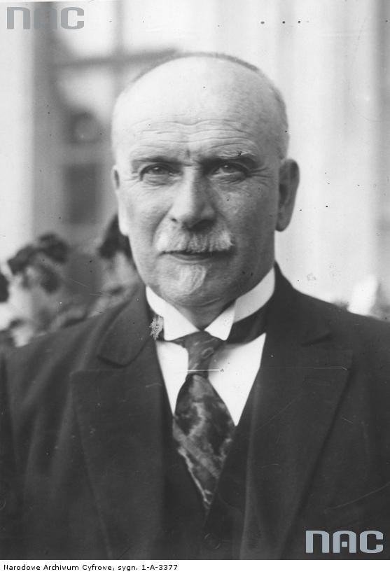 Wincenty Bogucki - (1871-1929) wiceprezydent Warszawy